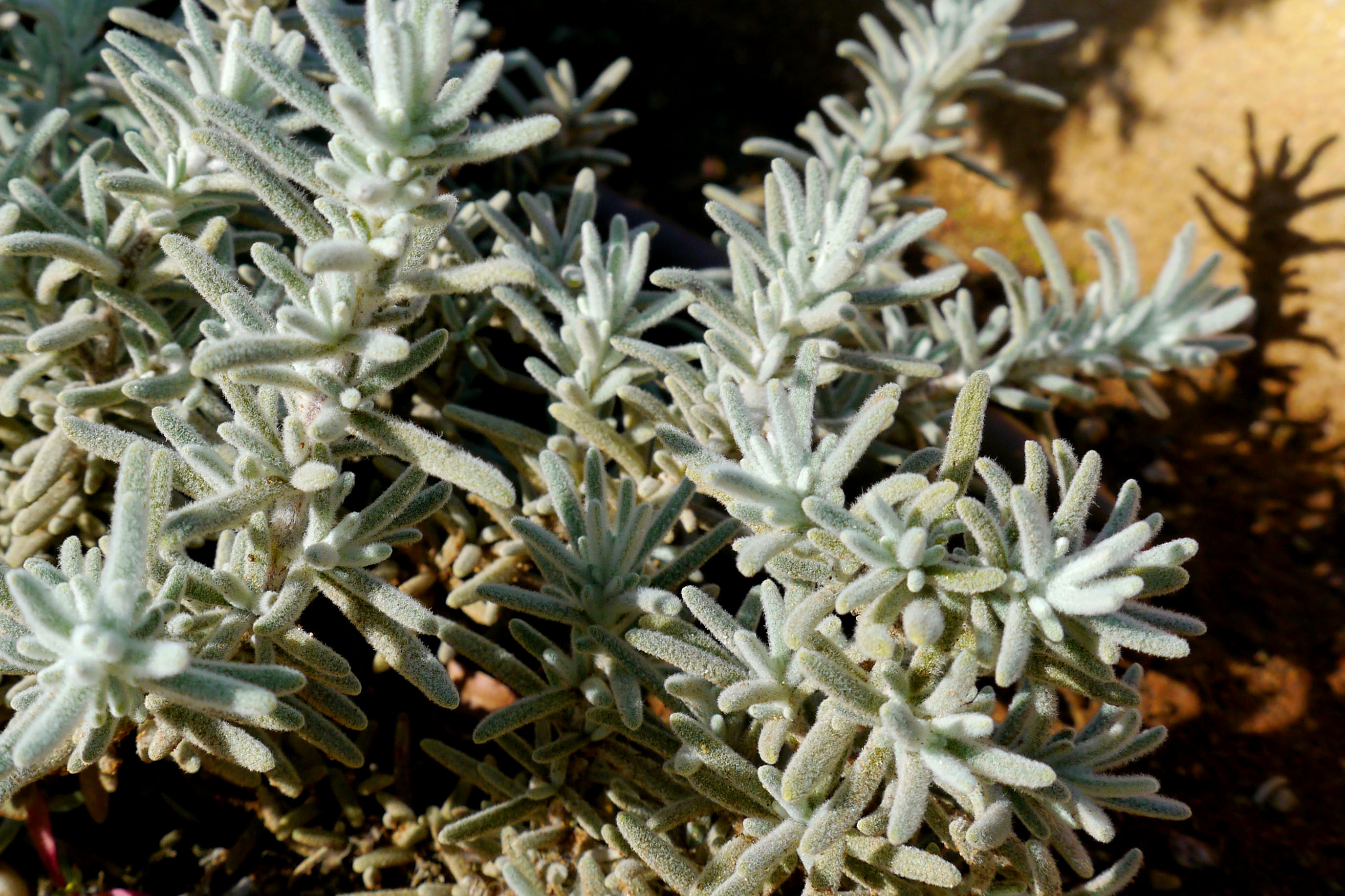 Rosmarinus tomentosus (romero tomentoso) en el jardín botánico de Rodalquilar, Almería, España.